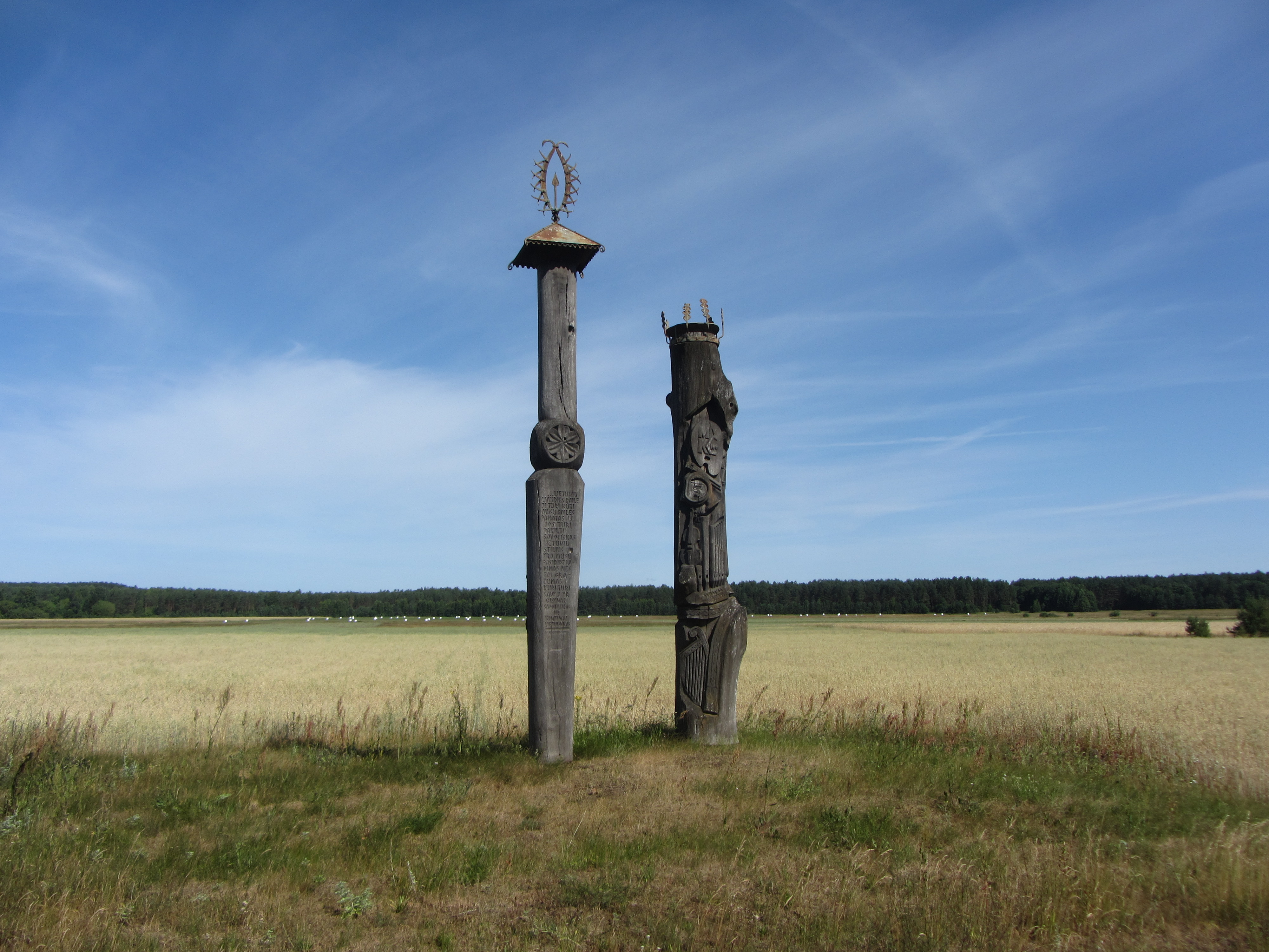 Varėnos sen., Lithuania